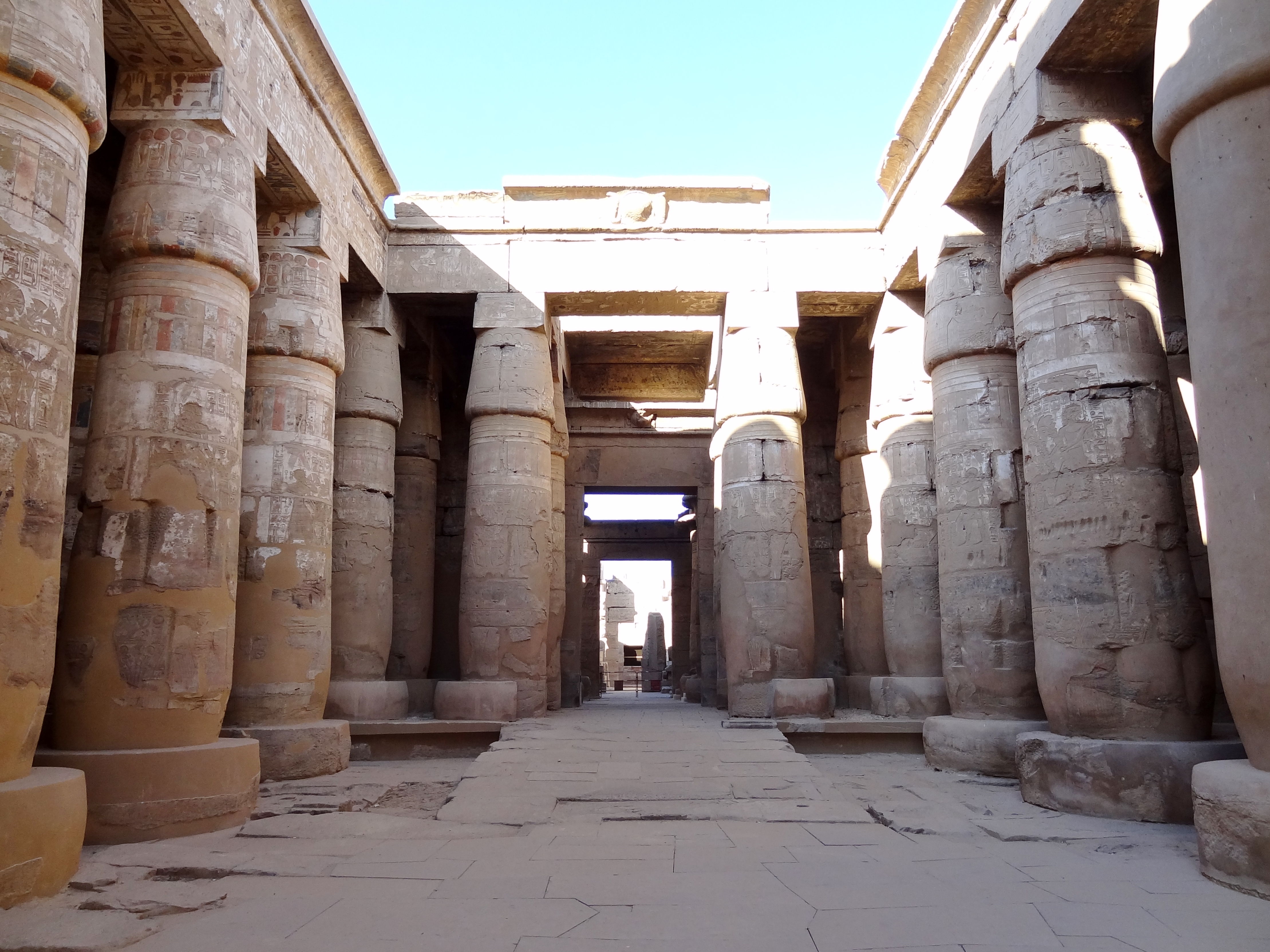 Kolonnadenhof (Peristyl) des Tempels des Chons im Tempelkomplex von Karnak, nördlich von Luxor, Ägypten